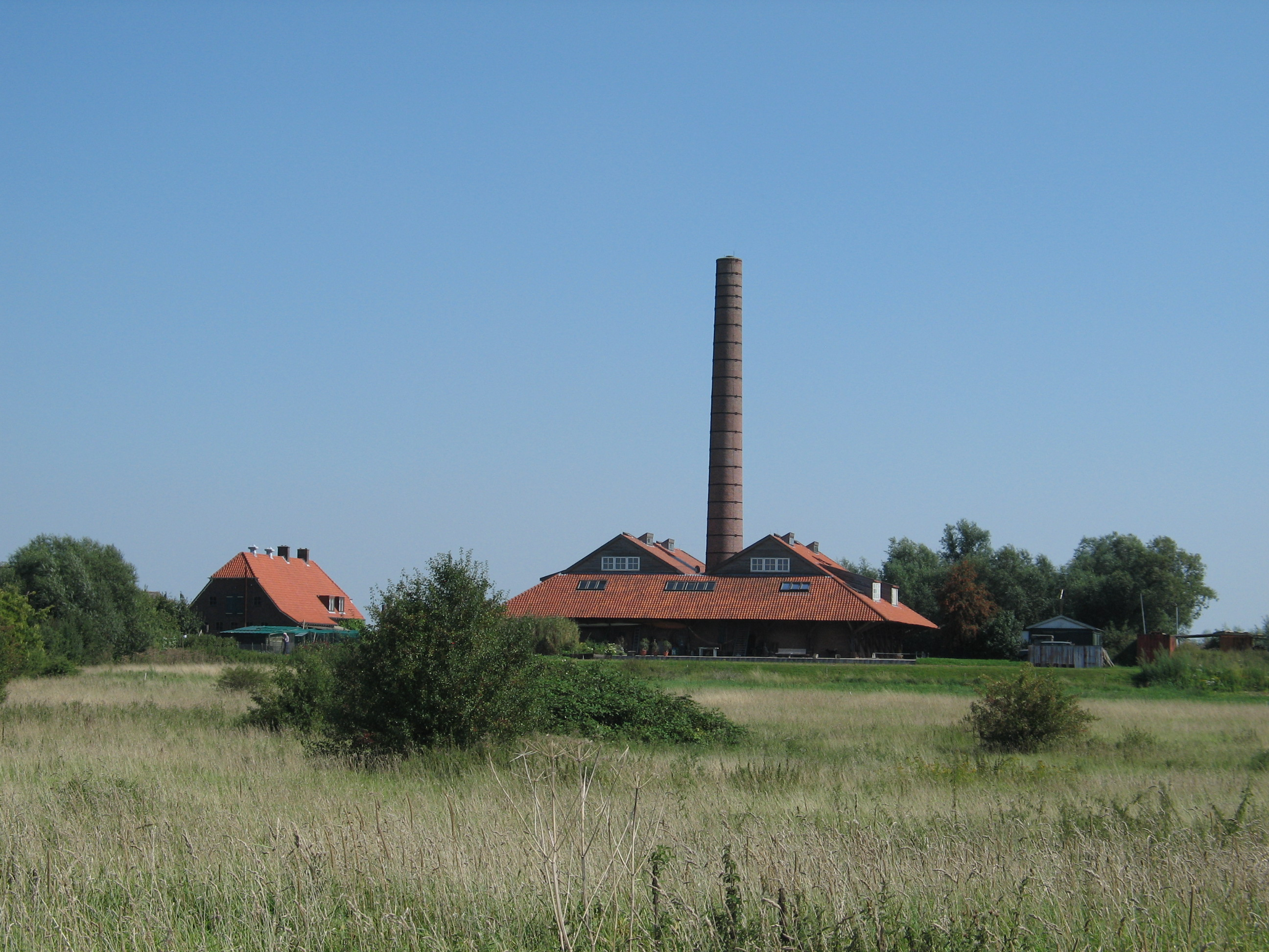 Steenfabriek De Bovenste Polder, Rijksmonument in Wageningen